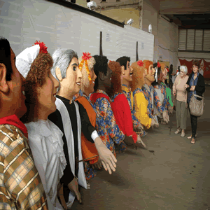 Bonecos Gigantes